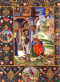 Bréviaire d'Ercole I d'Este, 1505-1512, Matteo da Milano, (Zagreb, Strossmayerova).